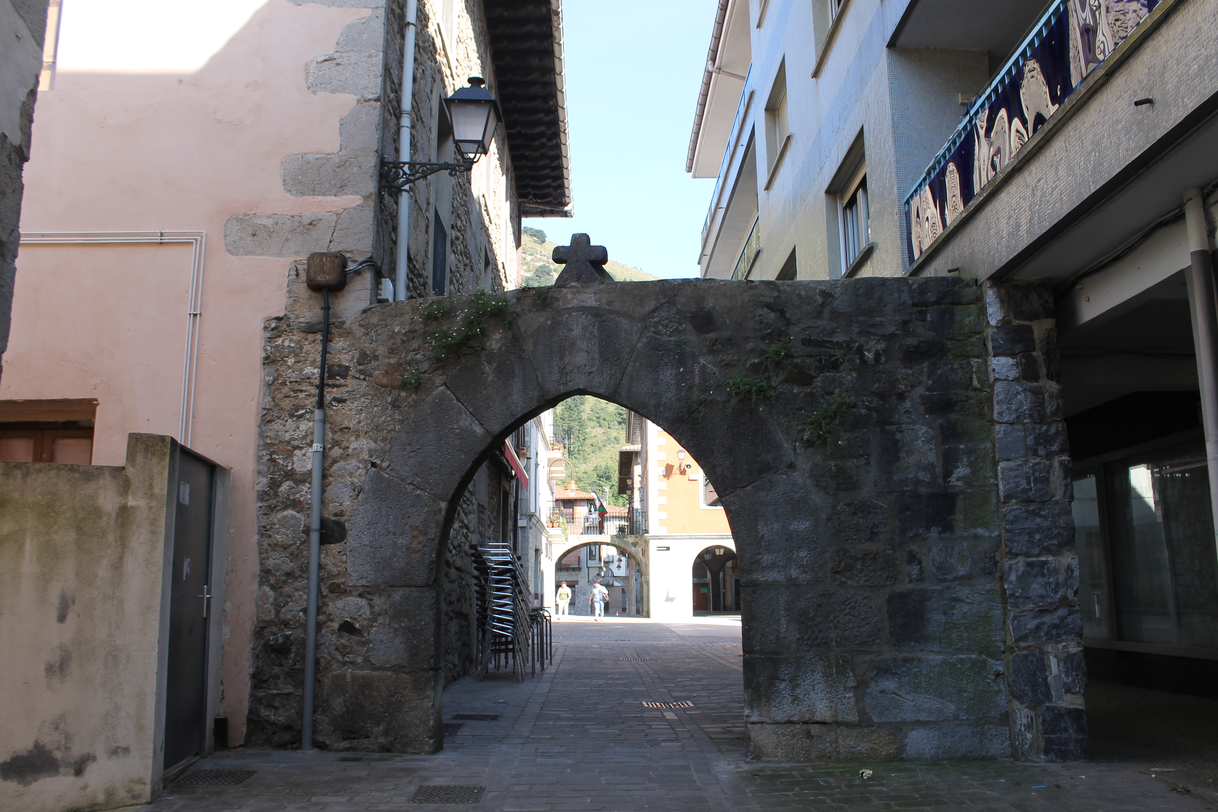 Cestona. Pequeño pueblo vasco entre montañas. Famoso por su balneario.